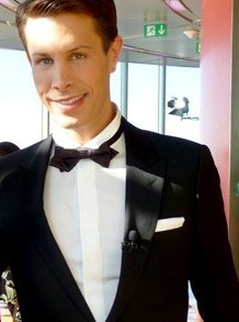 Florian Wess im Jahr 2011.